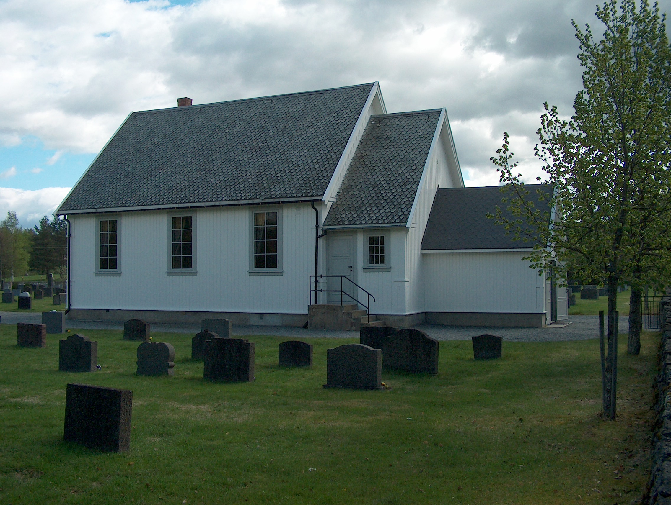 Kapellet ved Lunder kirke, Sokna